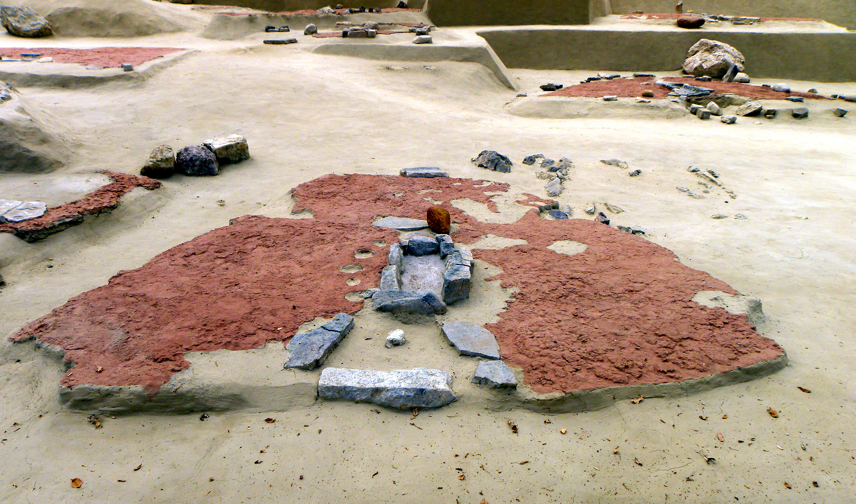 Lepenski vir